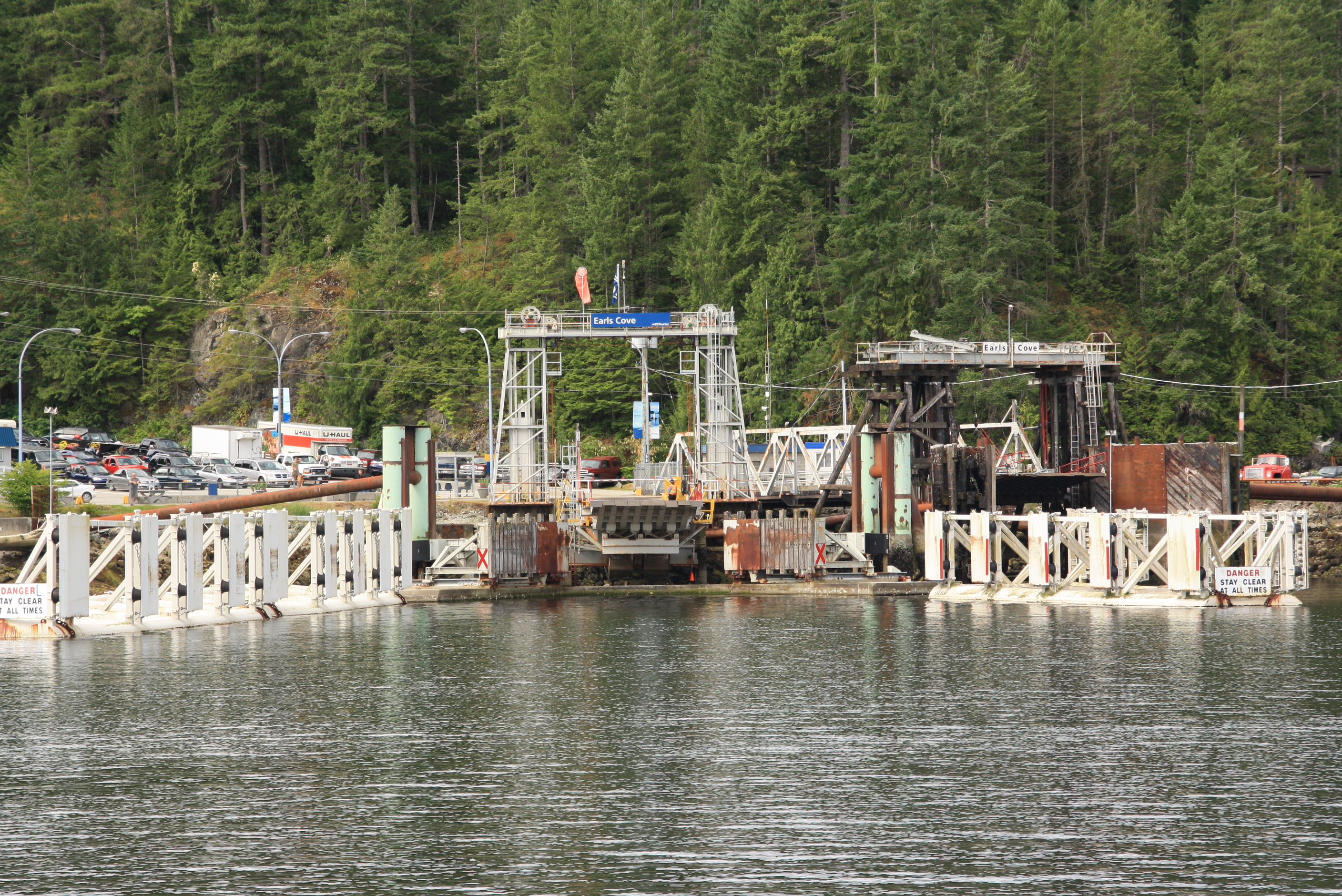 Earls Cove Fährterminal